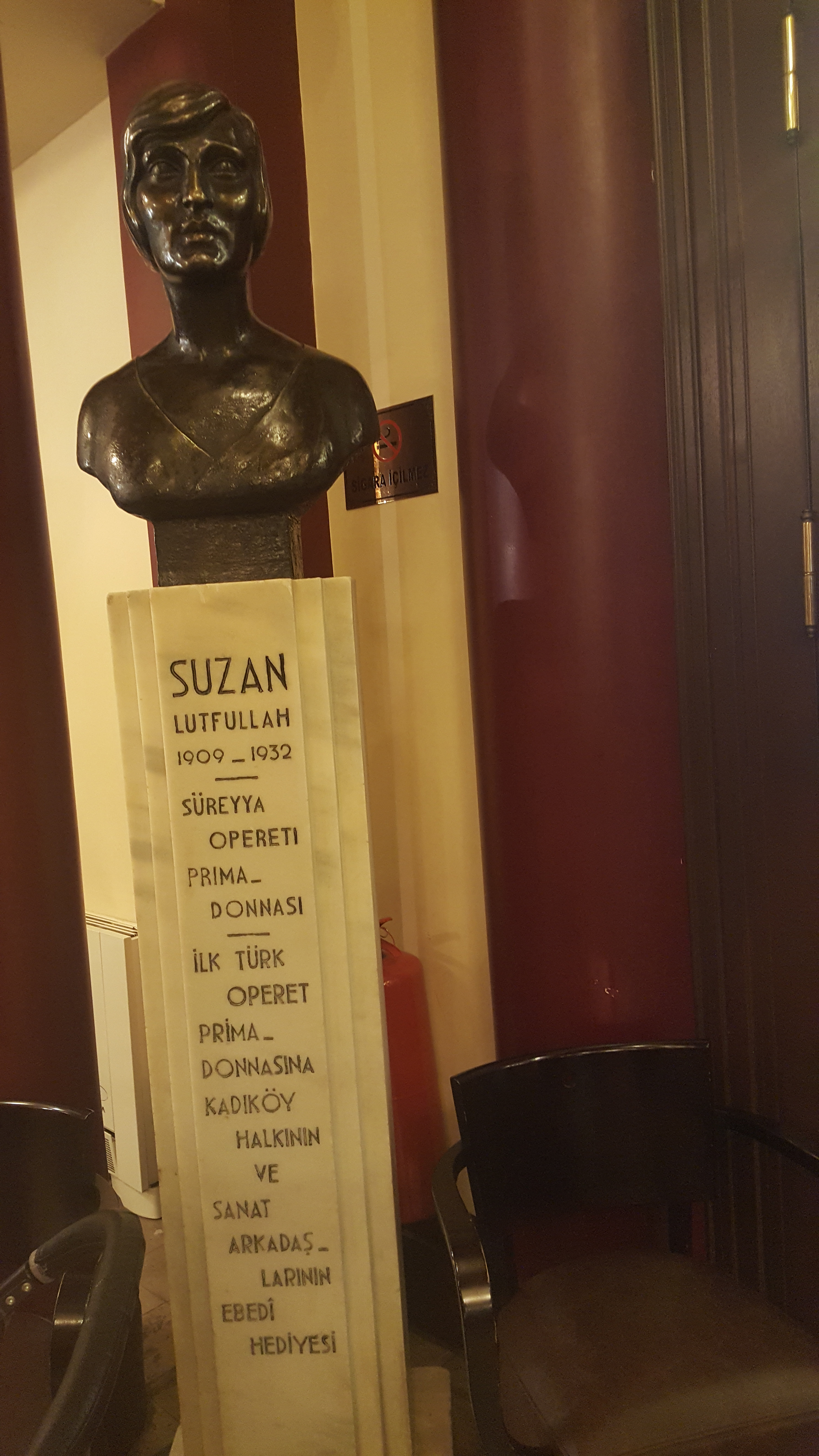 süreyya operasındaki büüstü